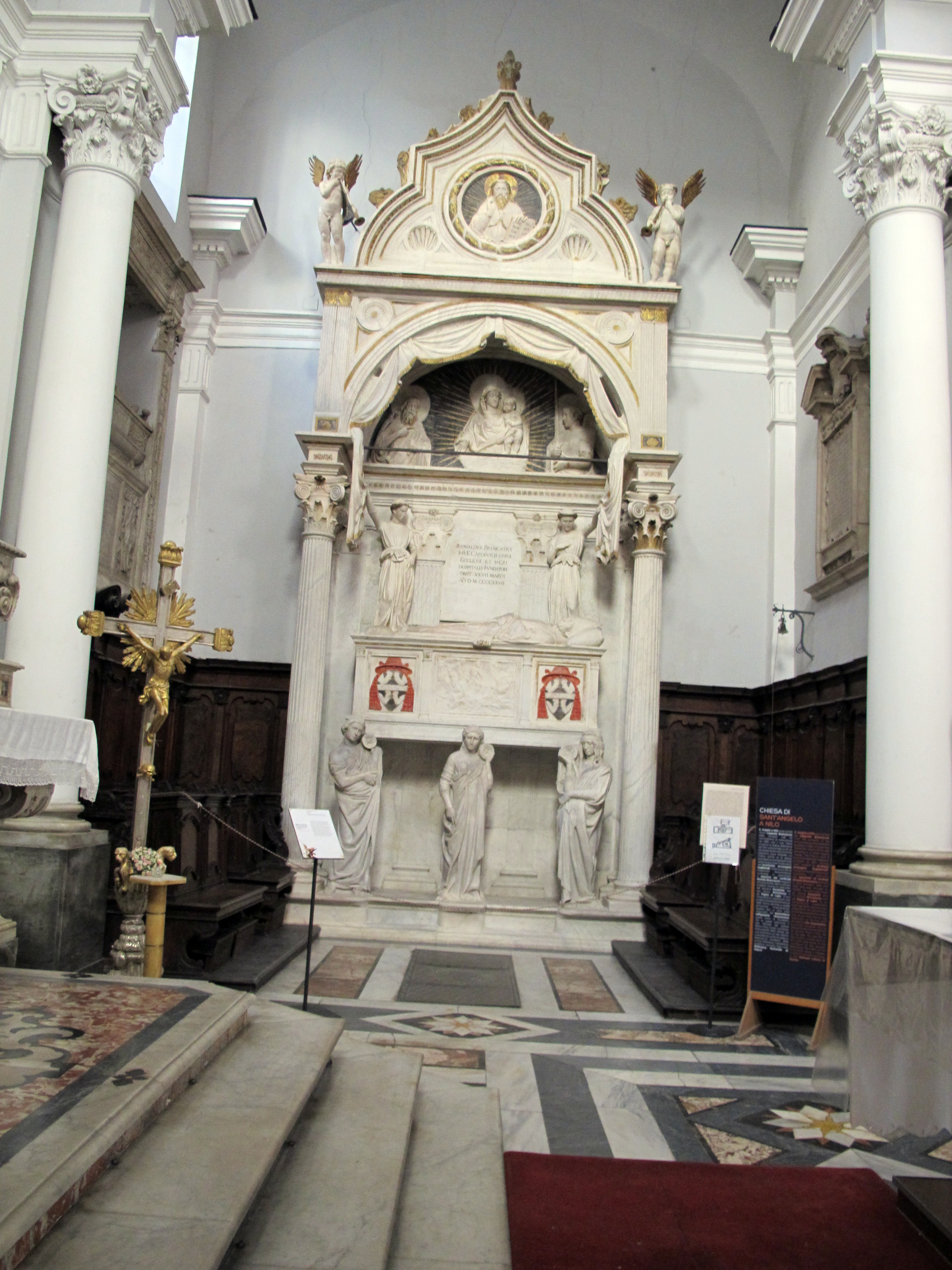 Napoli